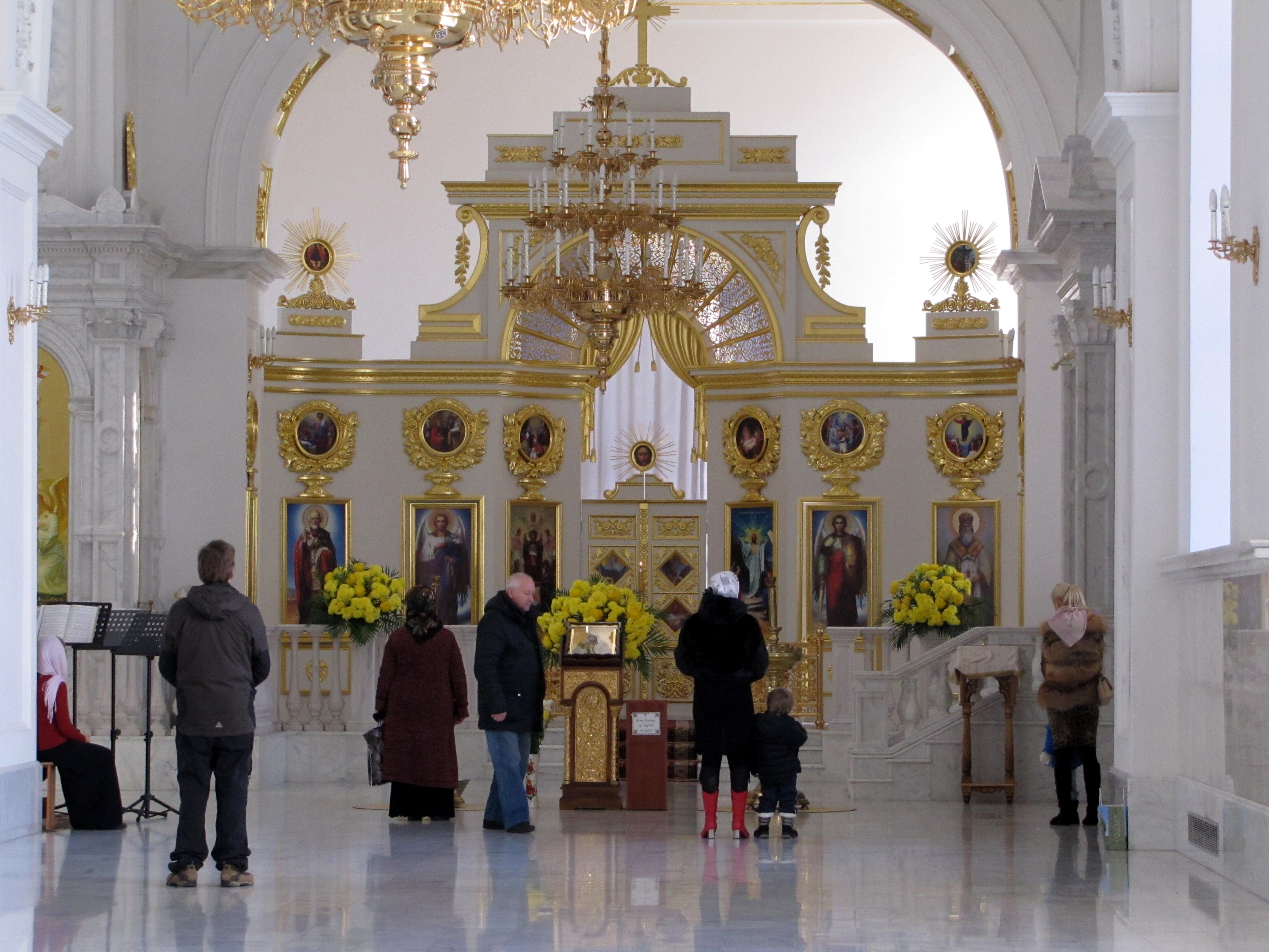 Pravoslavná katedrála v Oděse - boční loď